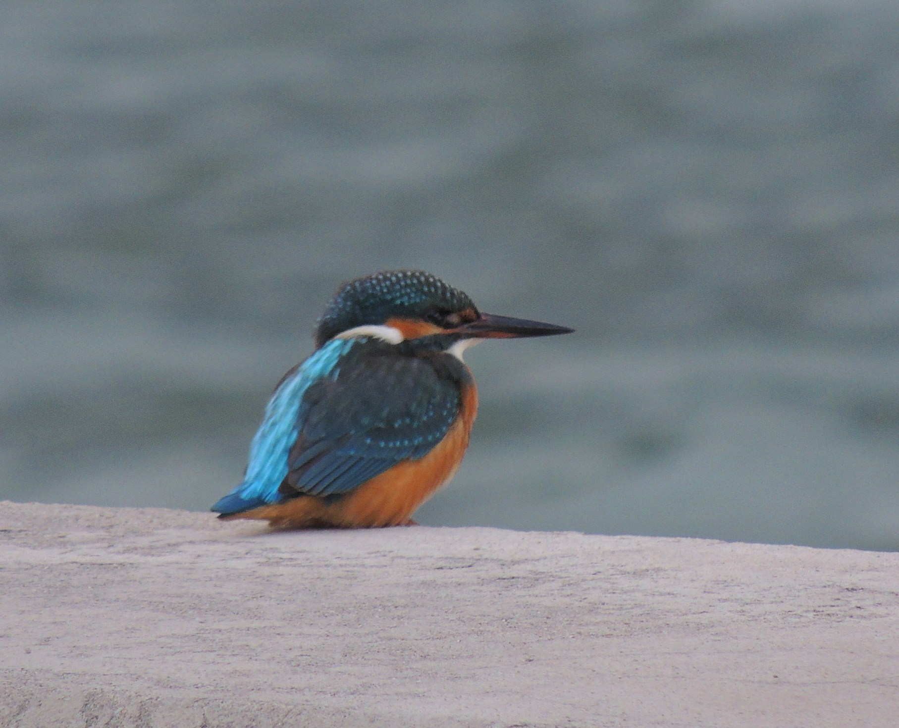 Photo d'un Martin-Pêcheur d'Europe, prise en Turquie entre Kemer et Göynük prés de la plage de l'hôtel-Club Phaselis.